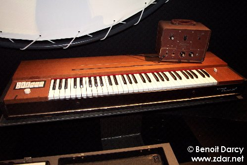 Photos de l'exposition "Pink Floyd Interstellar" à la Cité de la Musique (Porte de la Villette, Paris). Read the story at . Lire le compte-rendu de l'expo sur